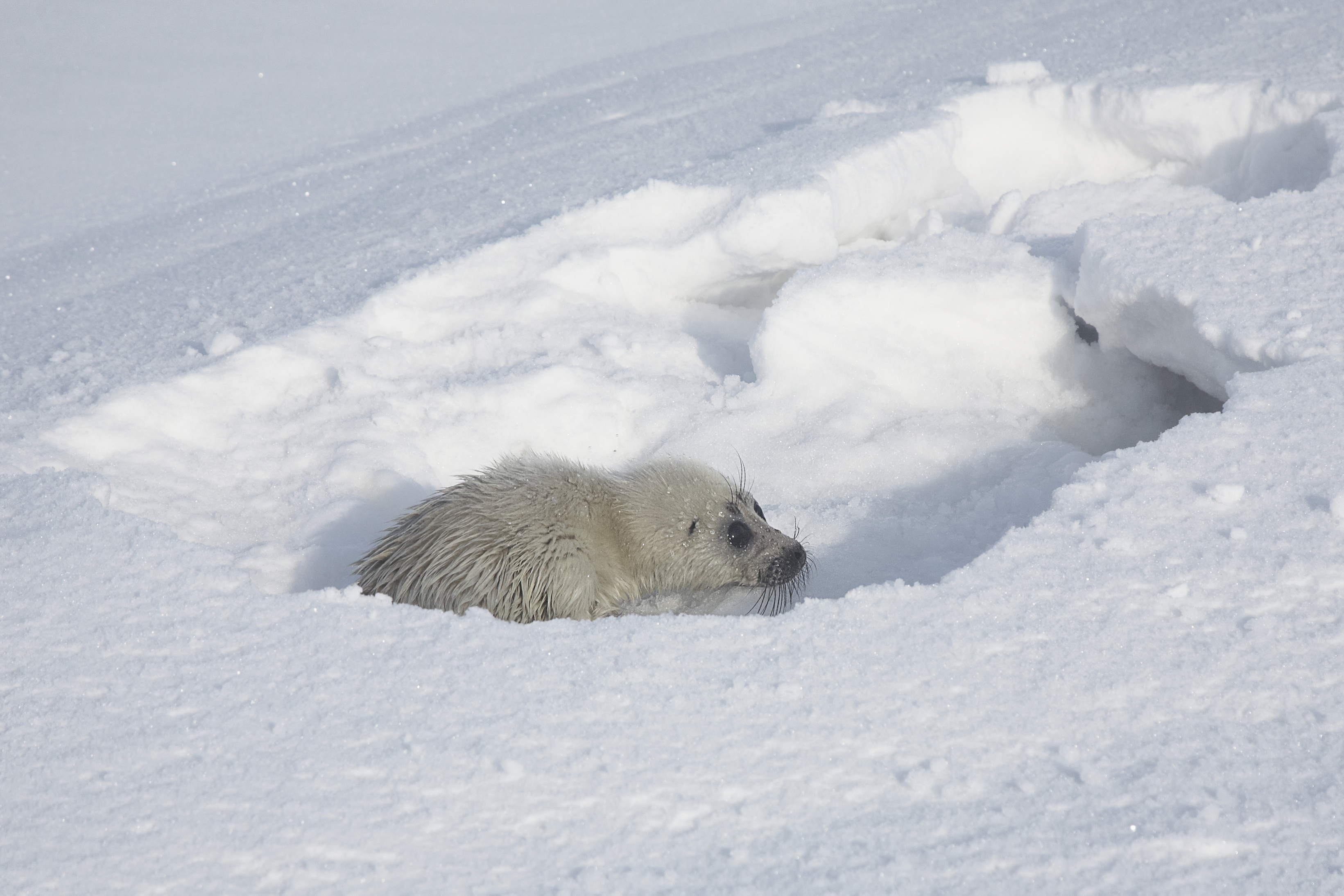 Забайкальский национальный парк: на восточном побережье озера Байкал, Баргузинский район, Бурятия This image is related to the protected area of Russia number 0300002